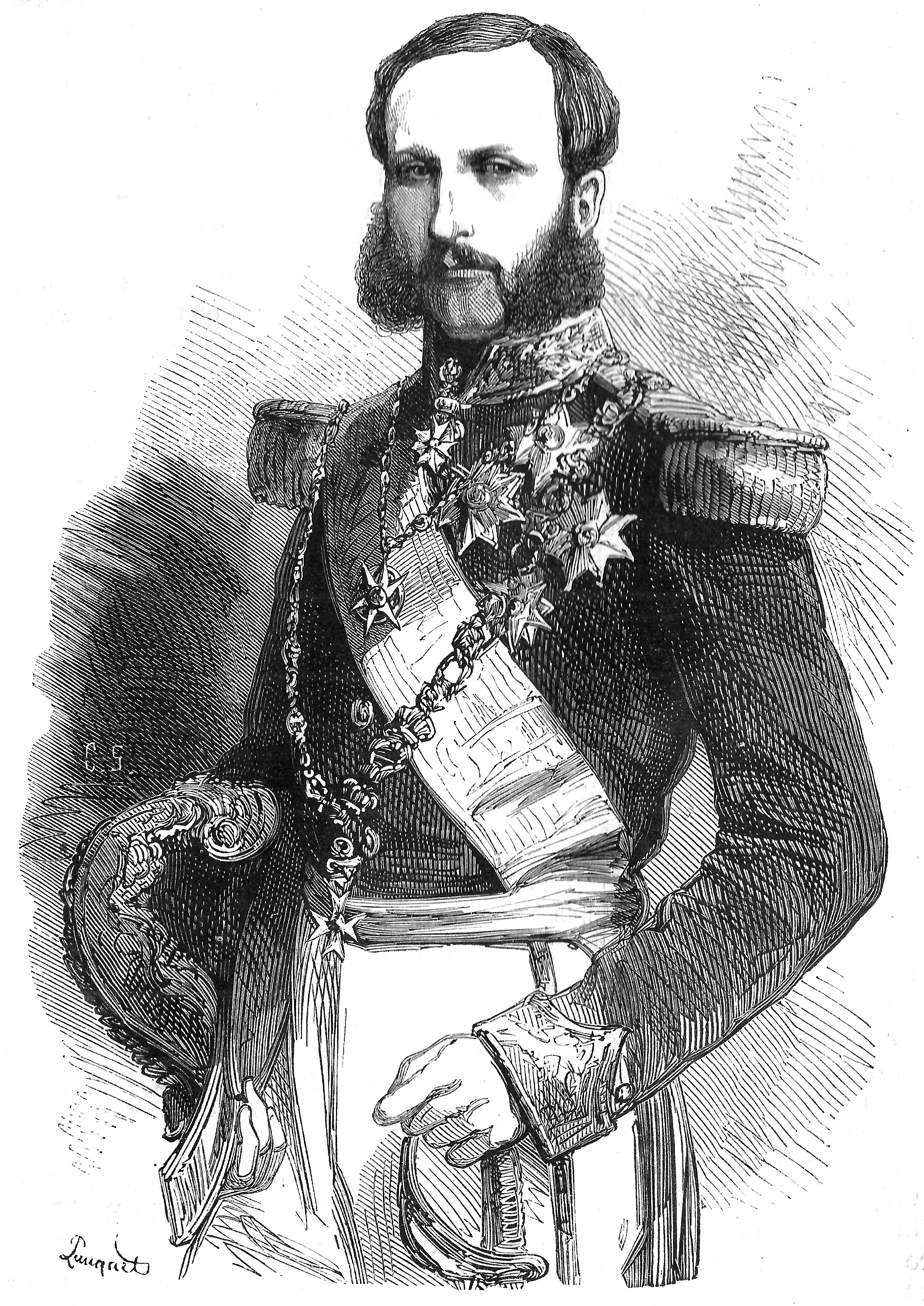 S.A.R. le prince Philippe de Belgique, comte de Flandre. — Le comte est en grand uniforme de général-major de la cavalerie, tel qu’il l’avait revêtu lors du mariage du prince de Galles. D’après une photographie prise le 1er avril 1863[1]. Gravure publiée à l’occasion de son futur mariage avec la princesse Marie de Hohenzollern-Sigmaringen qui aura lieu le 25 avril 1867.